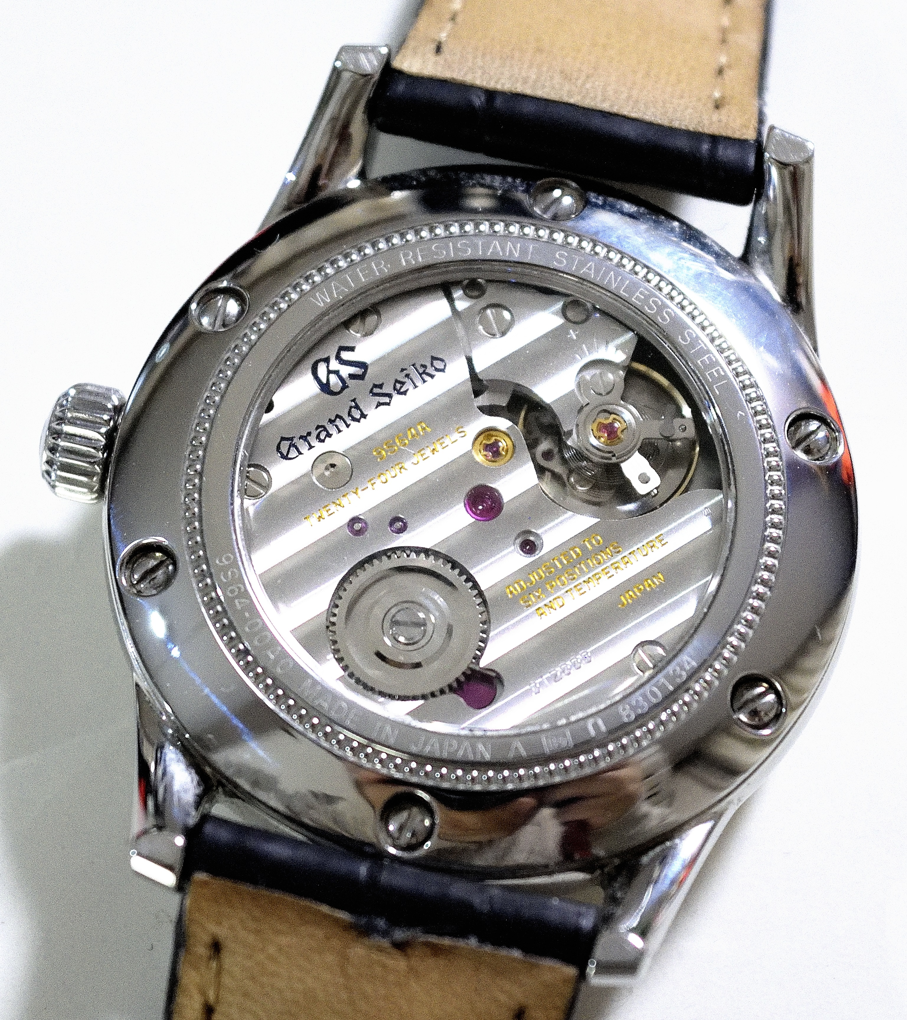 SBGW231 ９Ｓ６４ ムーブメント